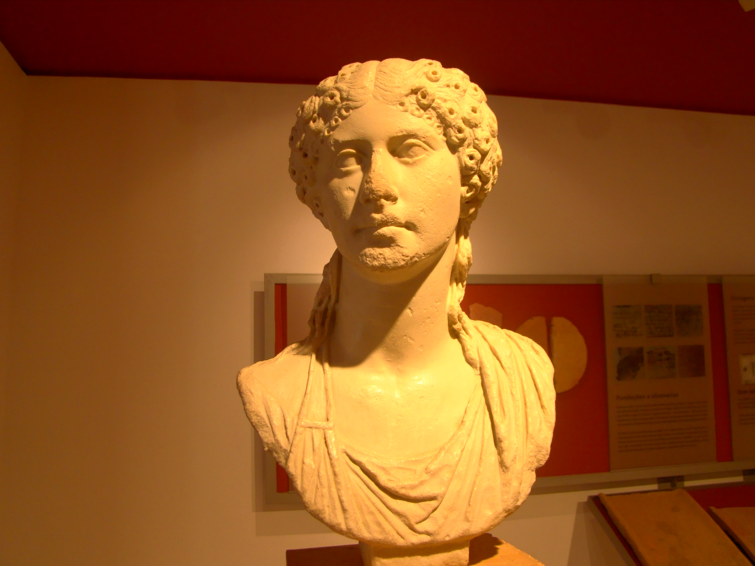 Ruinas de Milreu - Busto de Agripina - 15.11.2017